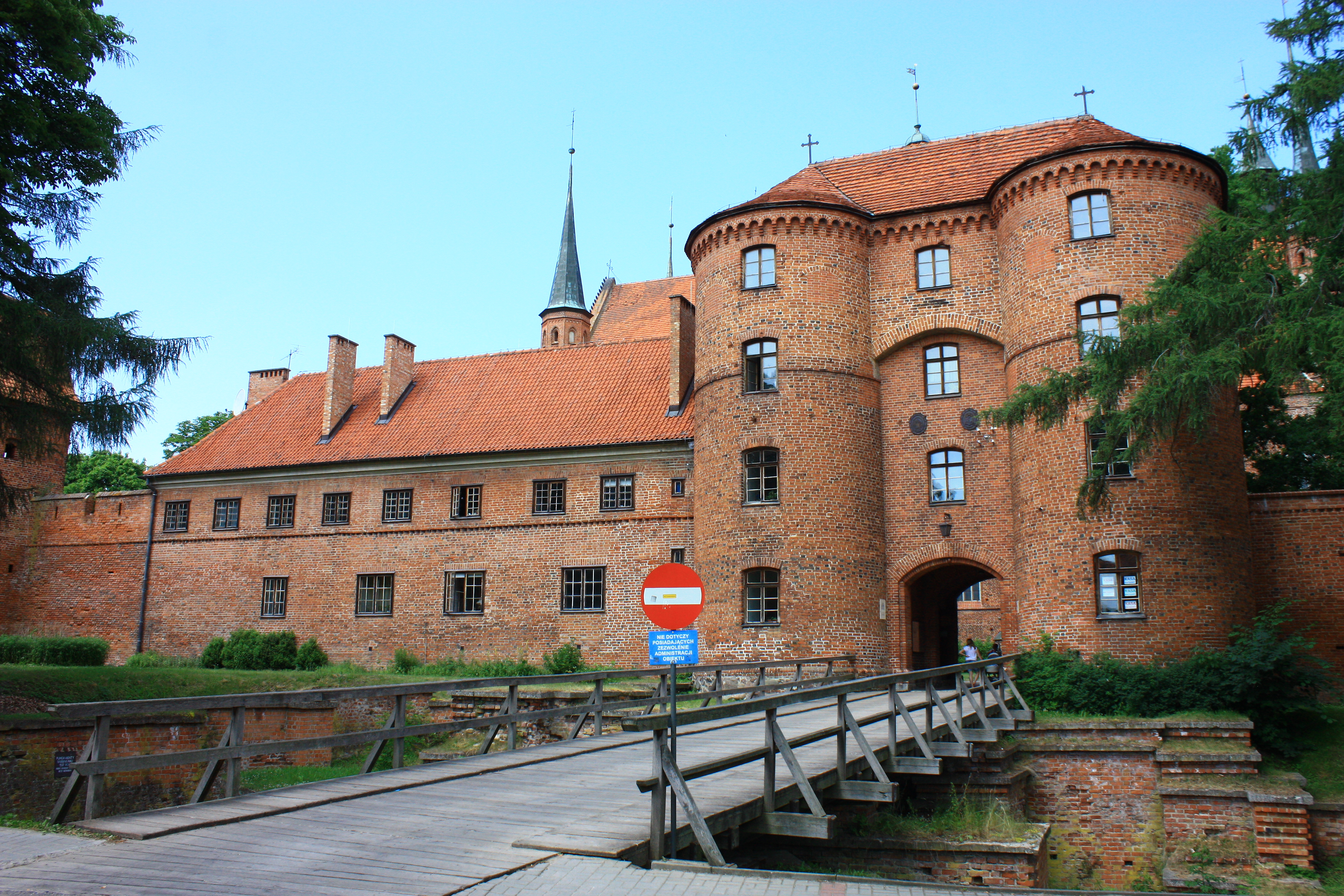 Frombork, brama południowa, XIV/XV, XVIII